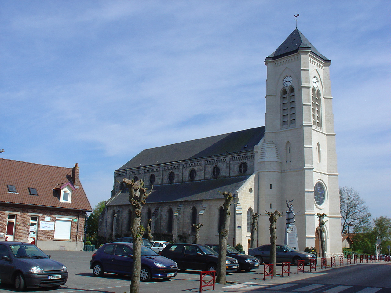 Église de Givenchy-en-Gohelle